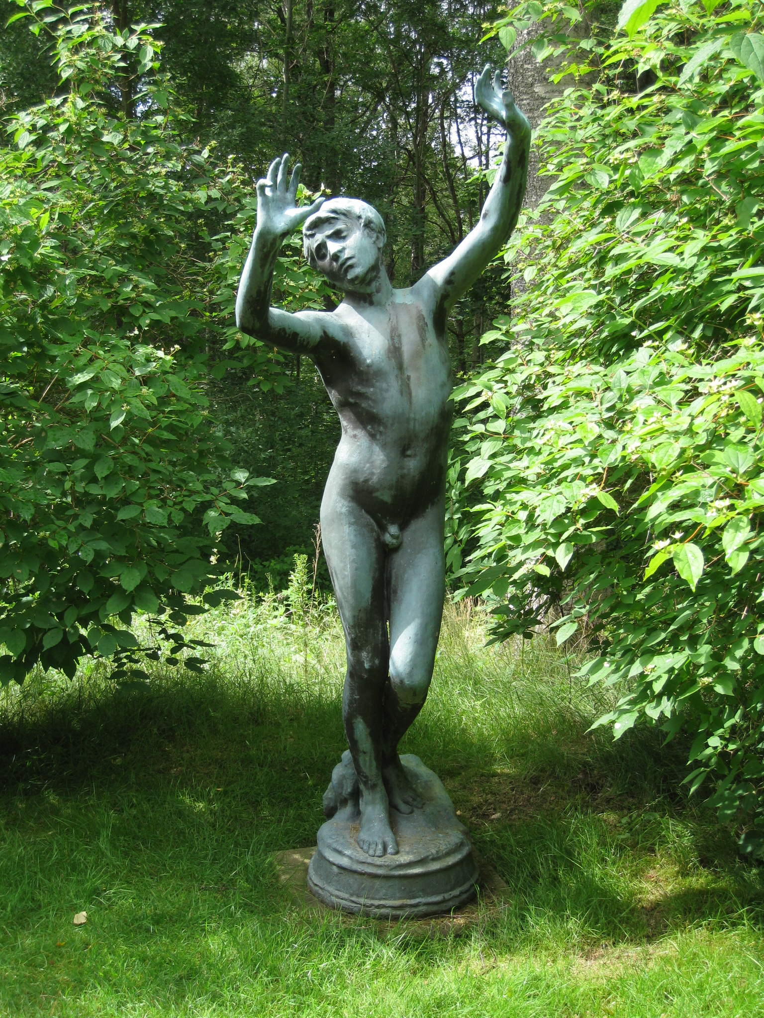 Christian Eriksson, "Martyren", skulptur, 1888, i trädgården vid Oppstuhage, Rackstadmuseet, Arvika, Värmland, med gjutarstämpel "J.N. Rosengren, Fud, Limhamn, 1888". Christian Eriksson fick medalj och stipendium för sin skulptur.